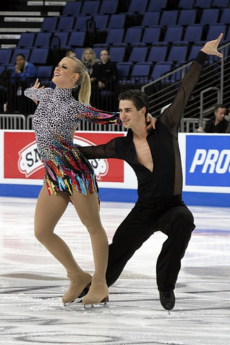 Madison HUBBELL and Zachary DONOHUE at the 2011 Skate America